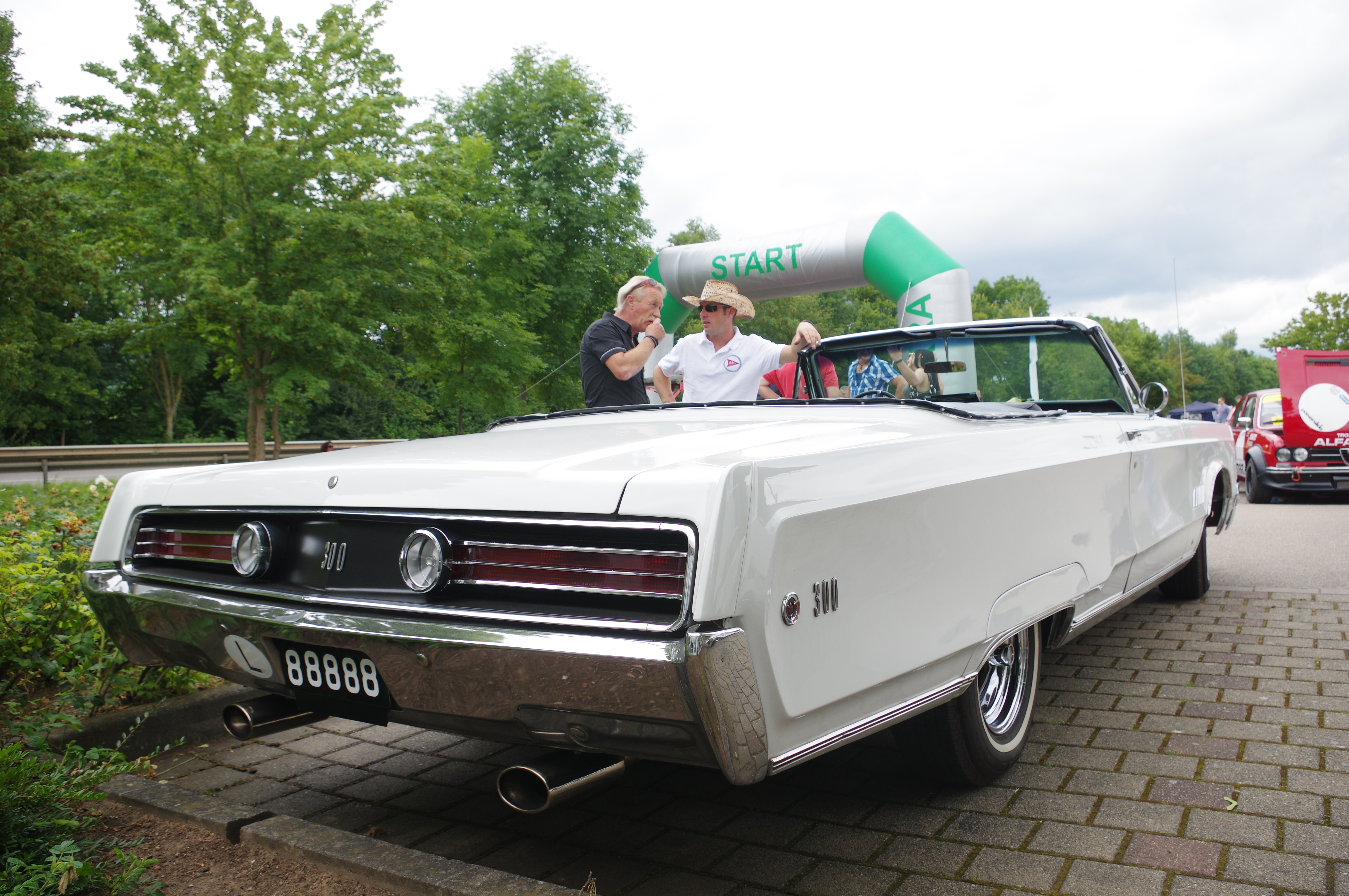 Chrysler 300 32. Internationales Oldtimer Treffen Konz 2016, Das Nummernschild ist verfälscht!